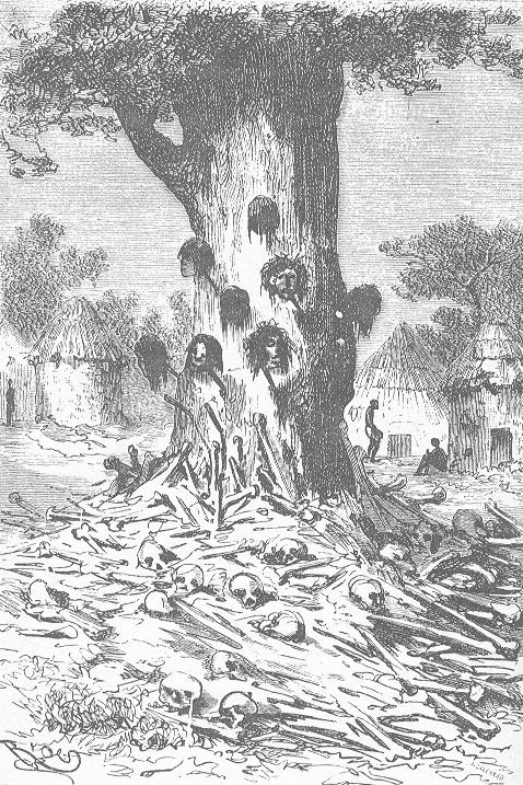 Ilustrace Edouarda Rioua